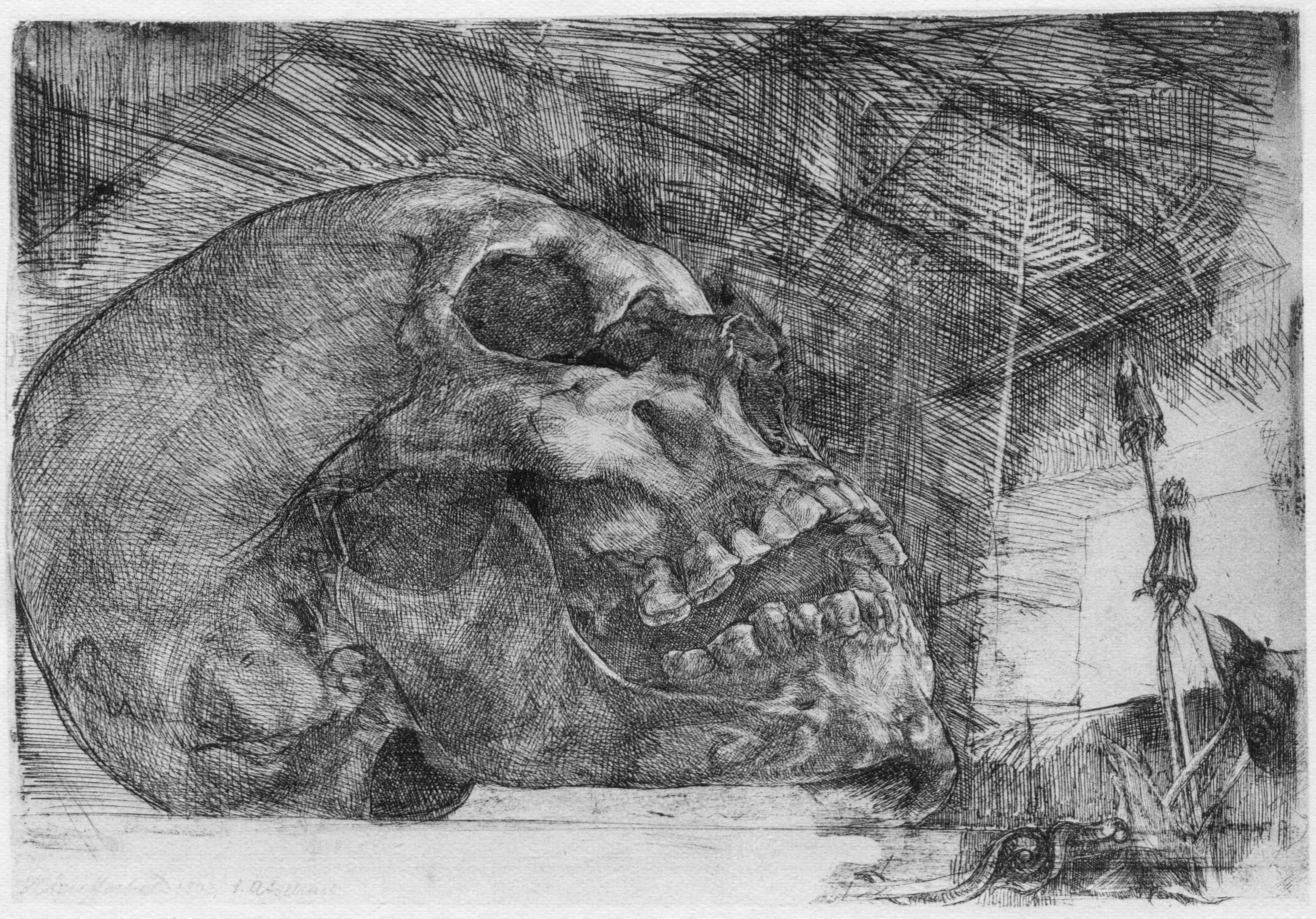 Totenschädel. Op. 14a,1 im Katalog der Radierungen. Strichätzung, Aquatinta, Plattengröße 176×250 mm